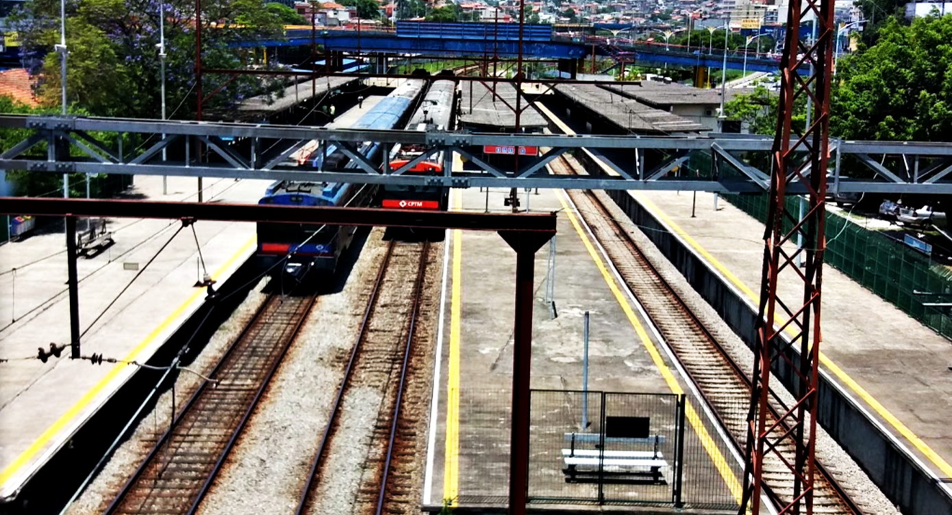 Plataforma da estação Mauá da Linha 10 da CPTM.